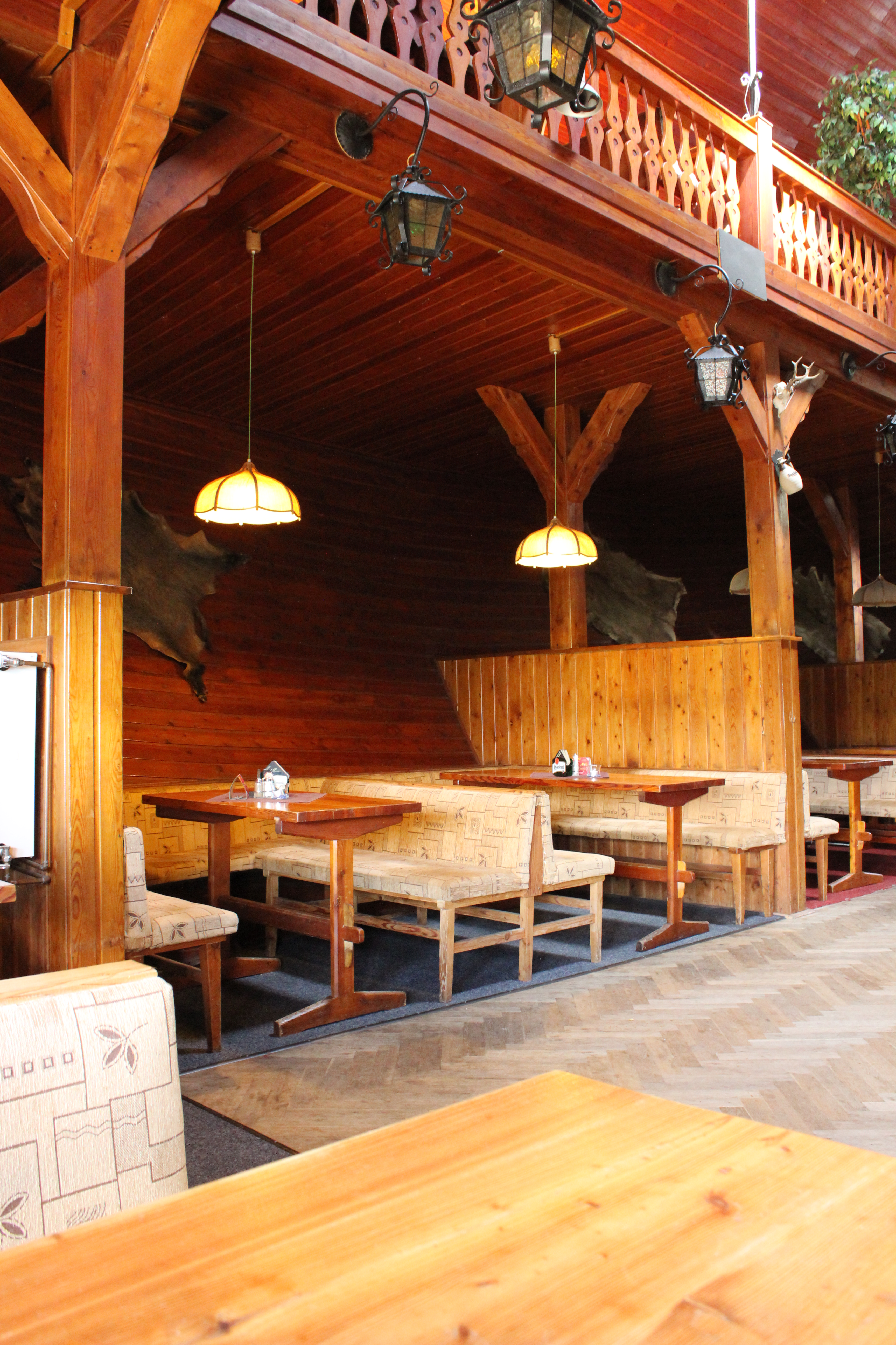 Interiér výletní restaurace Obří sud u Lázní Libverdy.